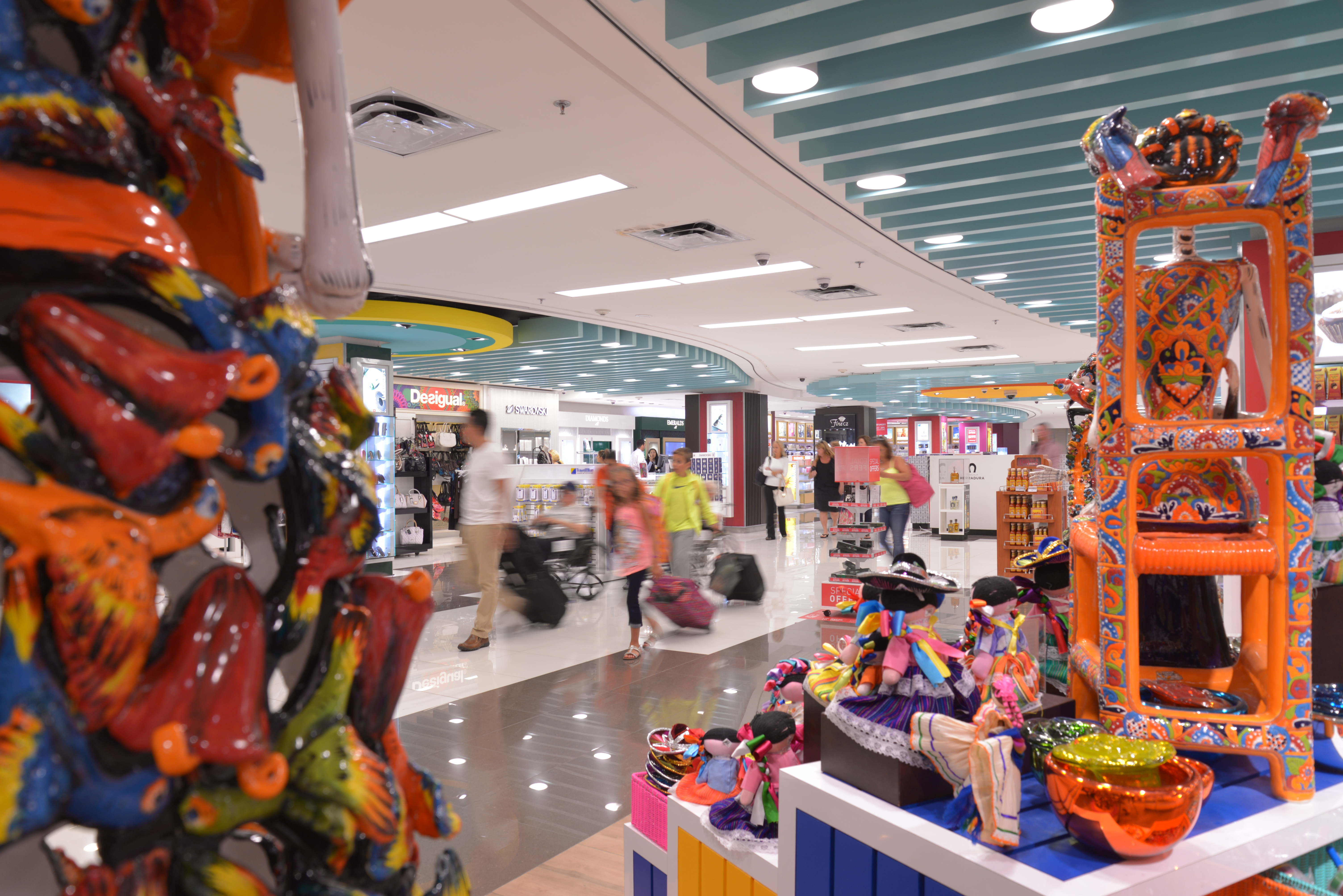 Aeropuerto Puerto Vallarta